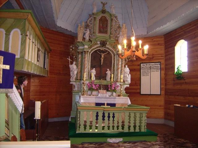 Maciejów - kościół ewangelicko-augsburski, drewn., XVI/XVII w.